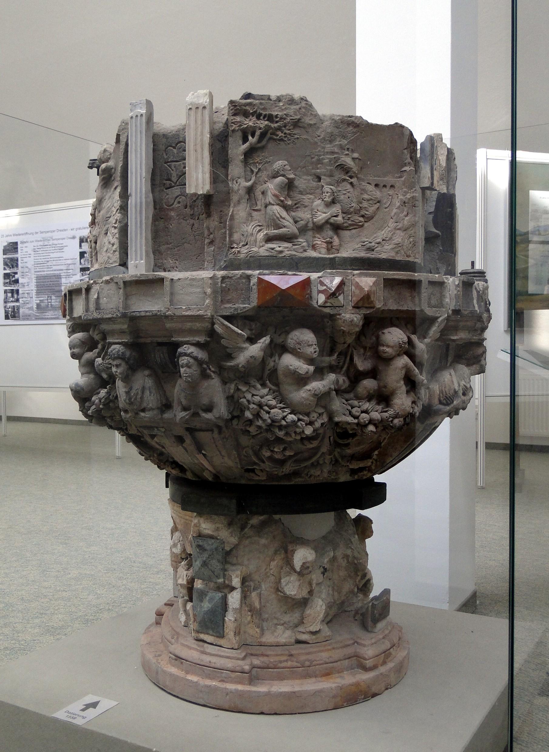 Taufstein der Schloss- und Busmannkapelle in Dresden, Landesamt für Denkmalpflege Sachsen